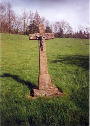 Rombach-le-Franc 052.jpg